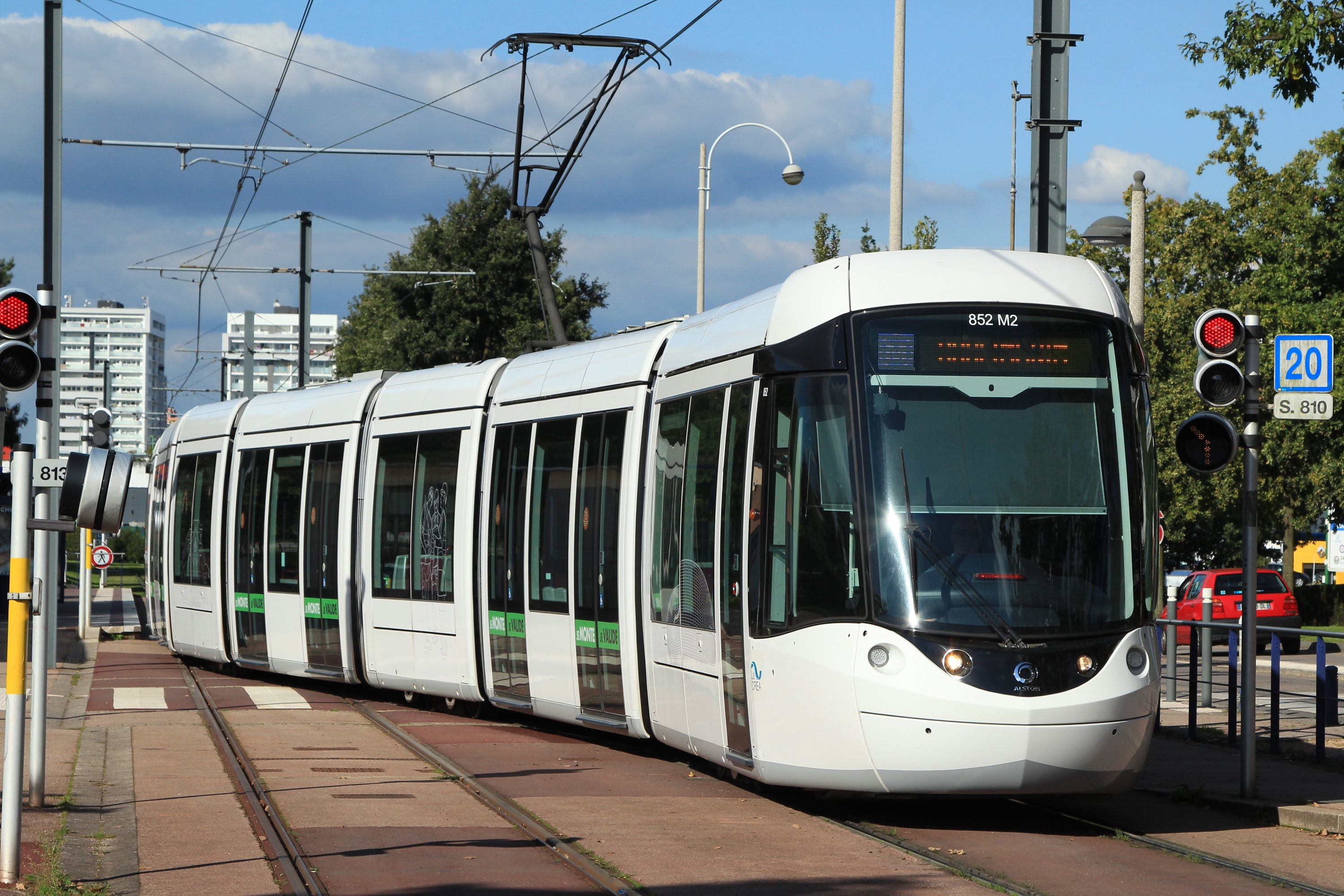 Rame Citadis n°852 effectuant son demi-tour au terminus Technopôle du tramway/métro de Rouen.